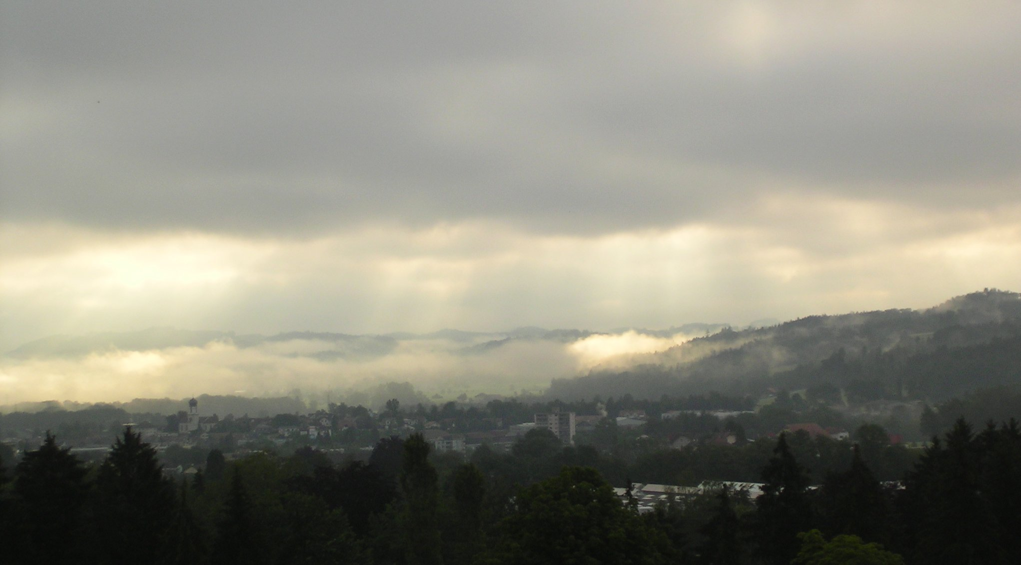 (en) Stratus Place: Switzerland Editing: GIMP cut (de) Stratus, durch die Sonne beleuchtet. Am Morgen. Aufnahmeort: Schweiz, SG Bearbeitung: GIMP Zugeschnitten Helligkeitswert angepasst